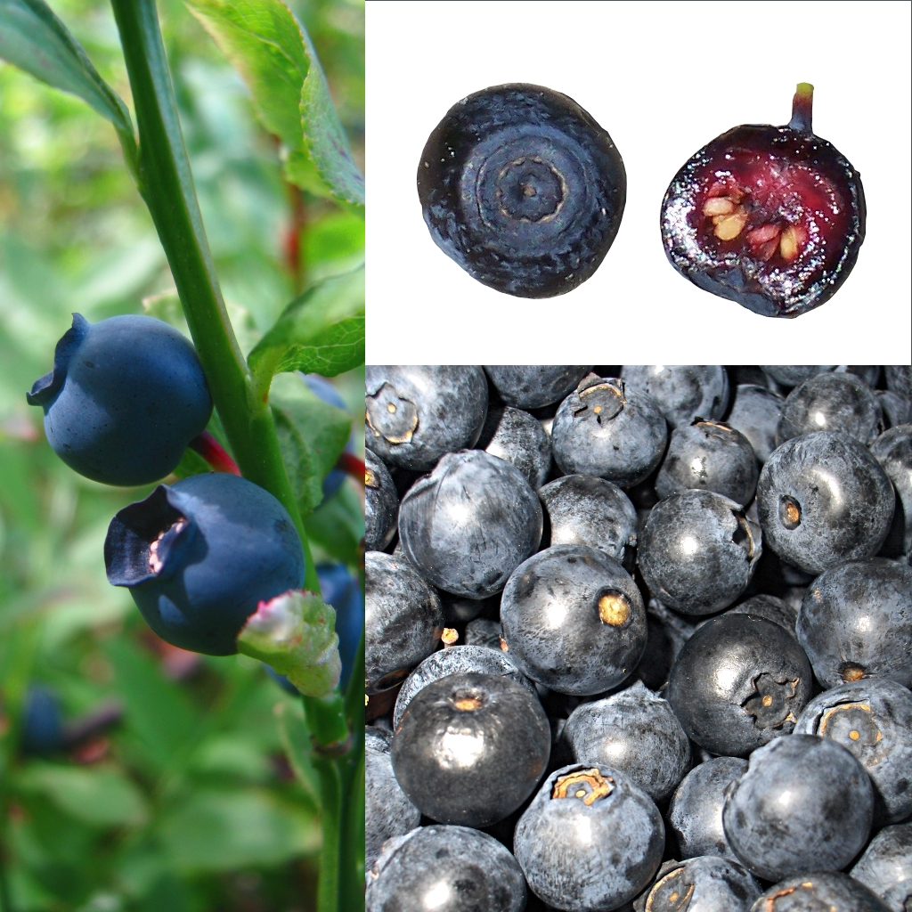 Grafika podręcznika Wikijunior:Owoce. Czarna jagoda, owoc borówki czarnej (Vaccinium myrtillus).